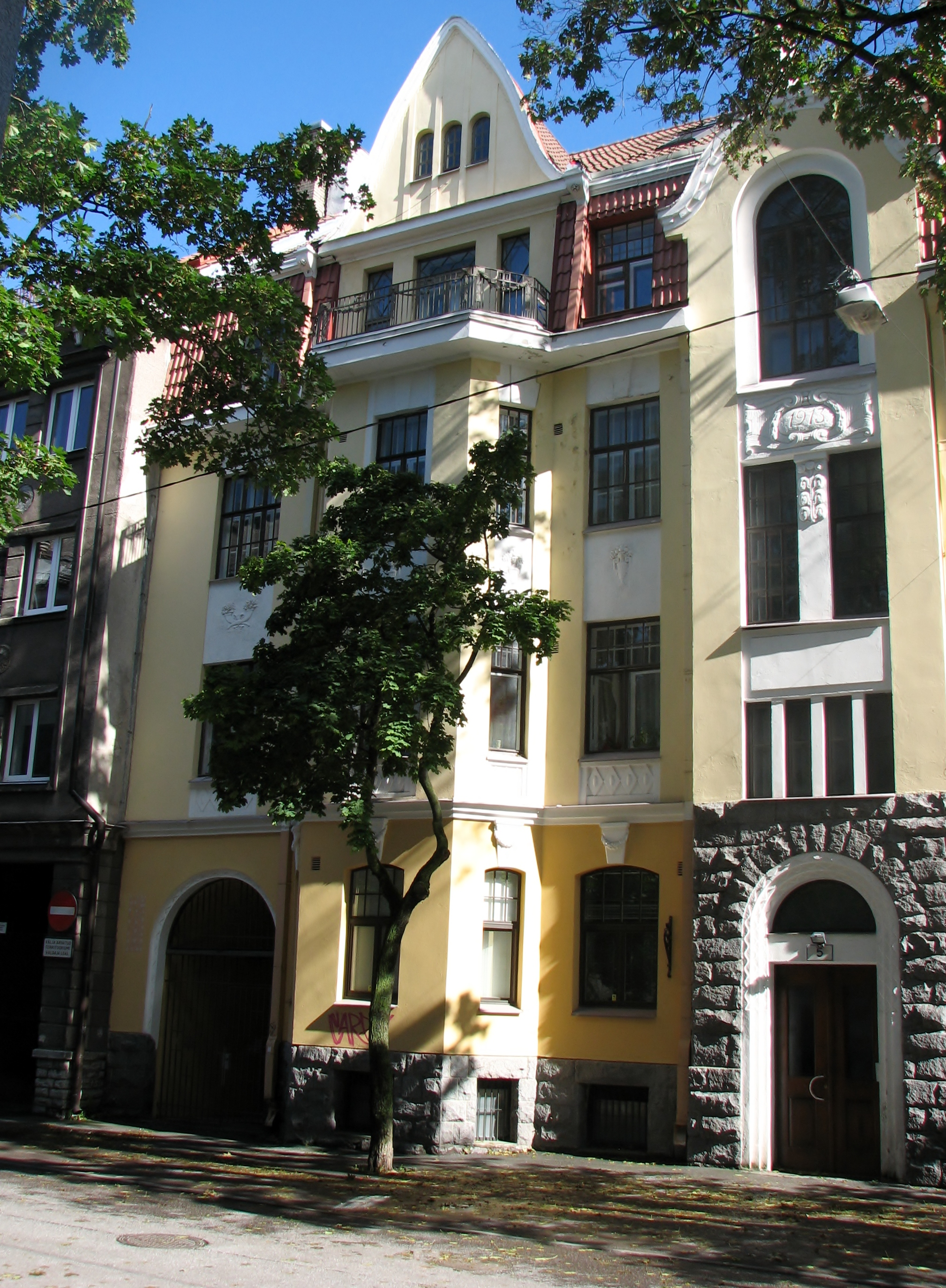 Elamu Kaupmehe tänav 5, 1913. a.